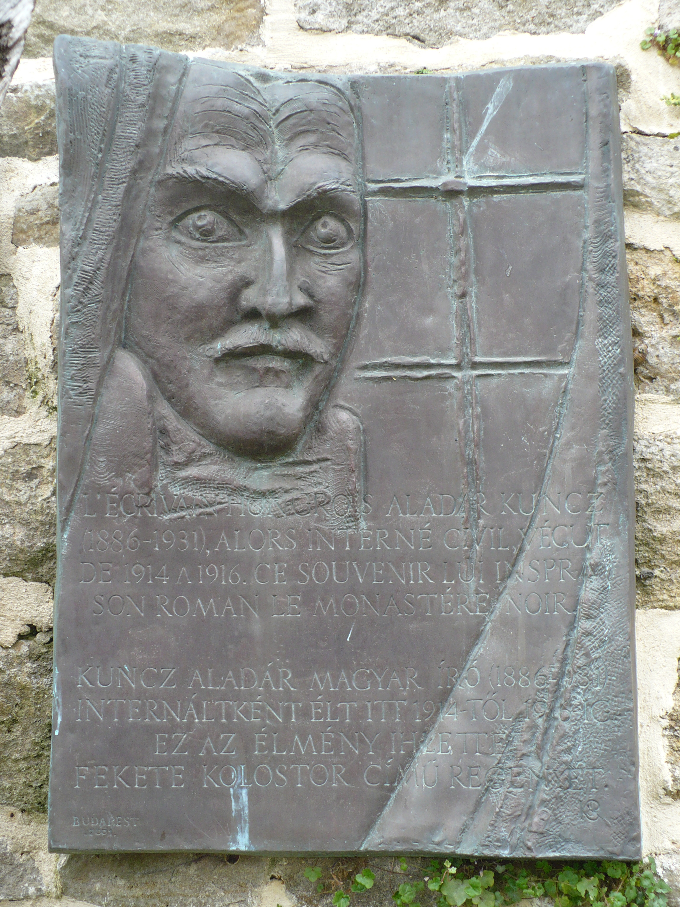 Photographie de la plaque commémorative d'Aladar Kuncz, prise au château de Noirmoutier.